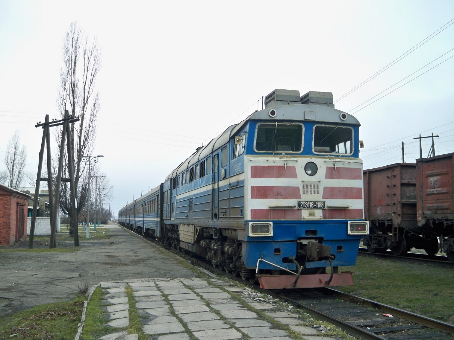 Секция тепловоза 2ТЭ116-1188 в составе дизель-поезд ДПЛ2. Станция Изварино, Луганская область, Украина.